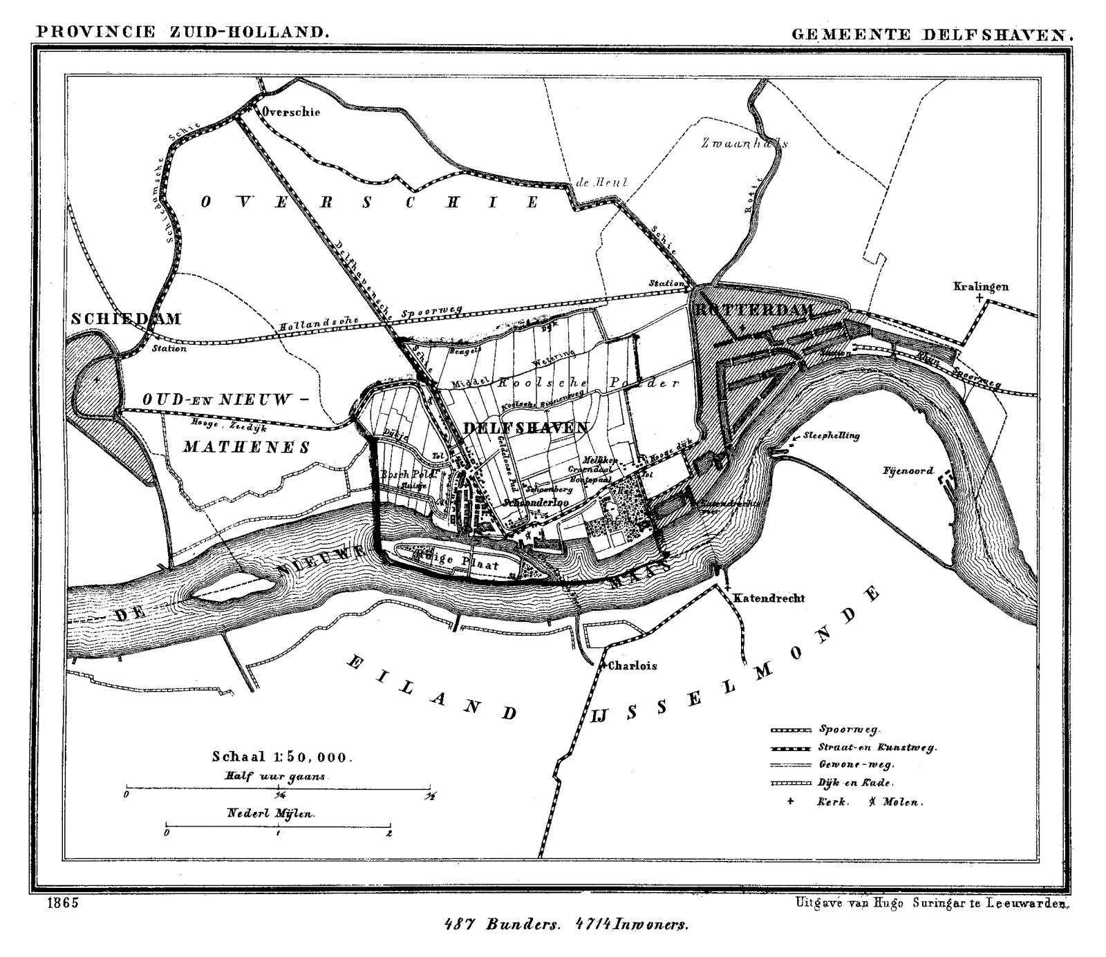 Malnova mapo de Delfshaven.